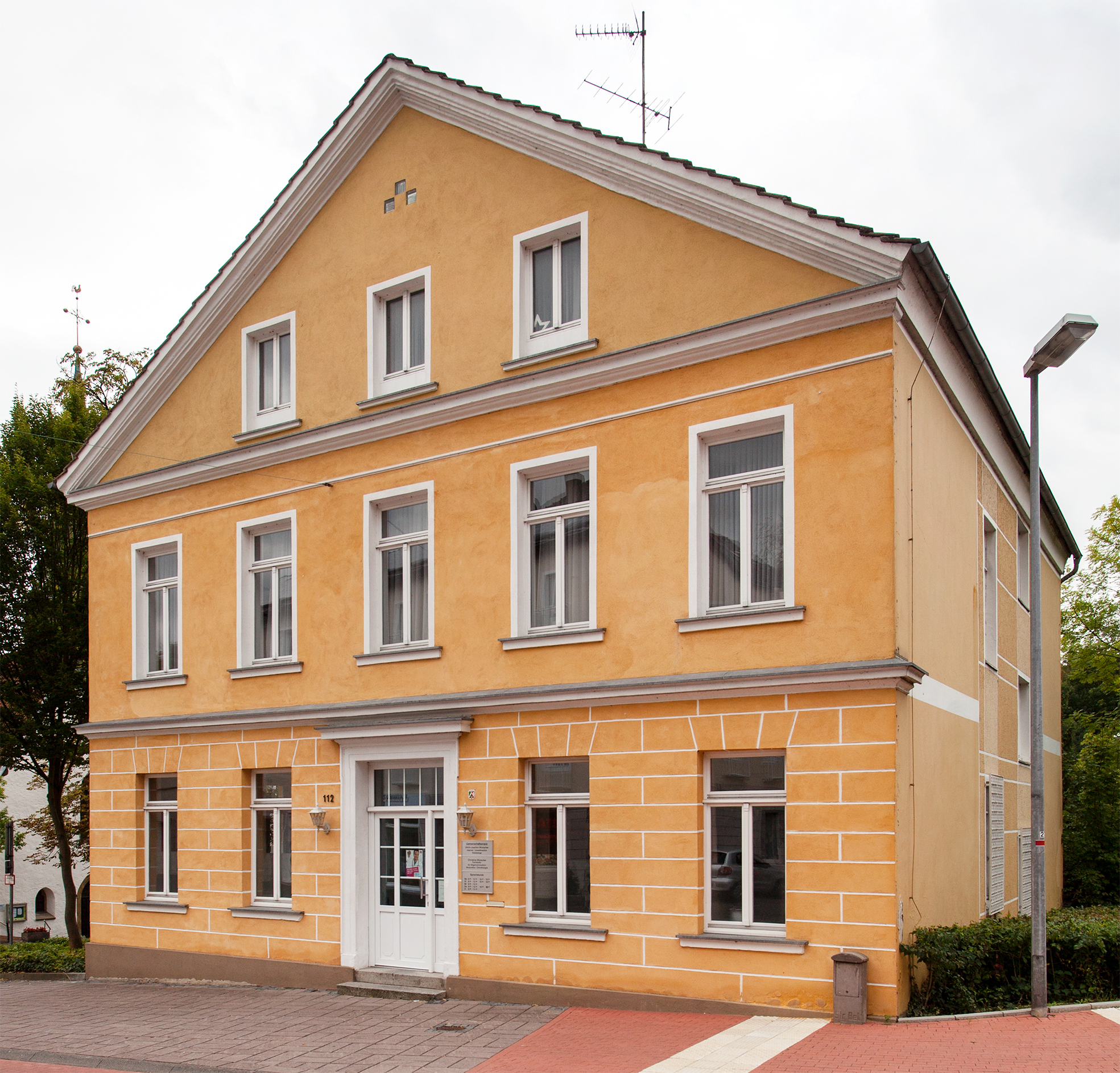 Vlotho, Lange Str. 112This is a photograph of an architectural monument.